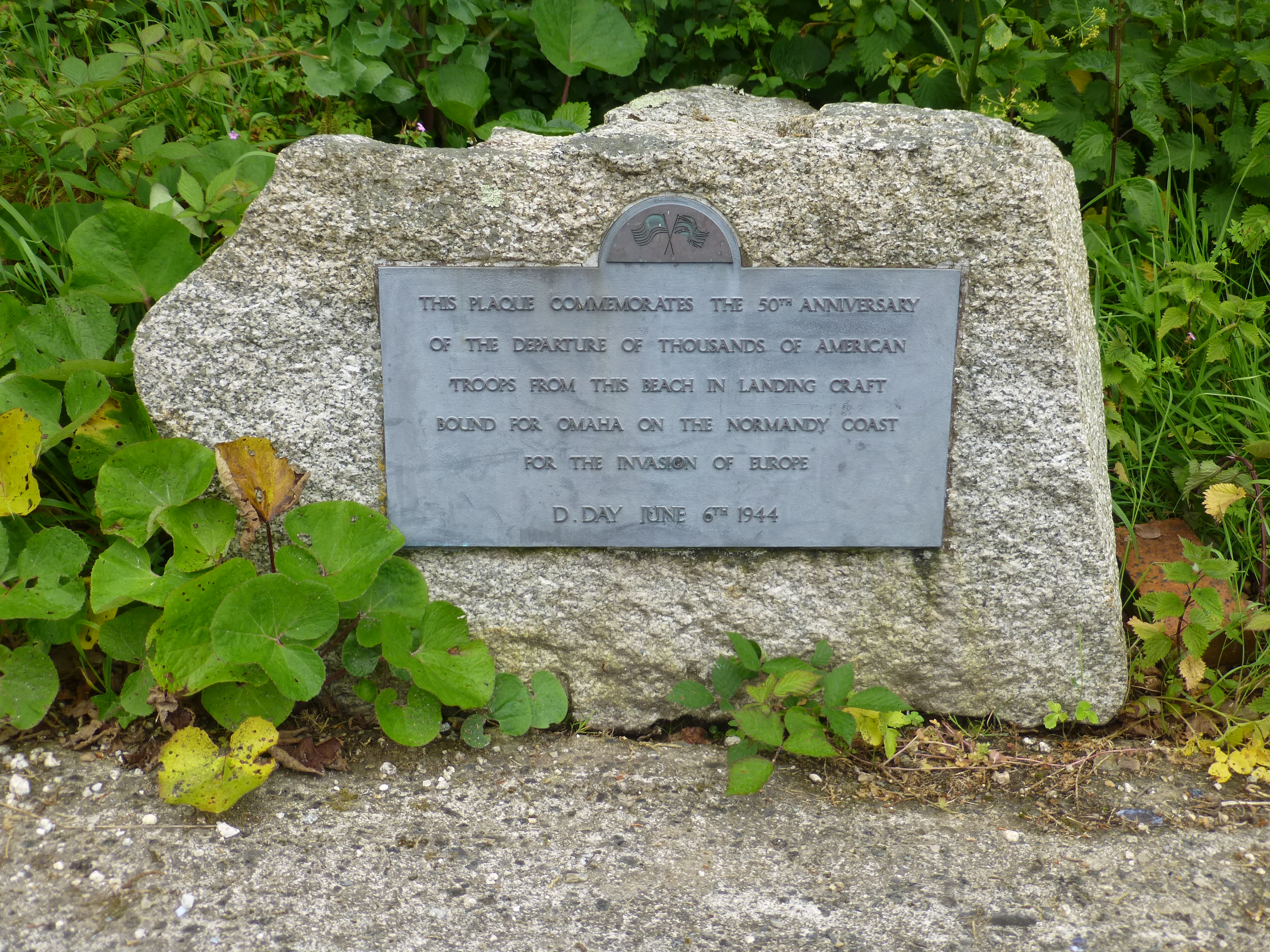 Gedenktafel D-Day